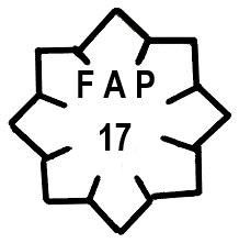 Escudo usado por las FAP-17 de Octubre, una escisión de las Fuerzas Argentinas Peronistas